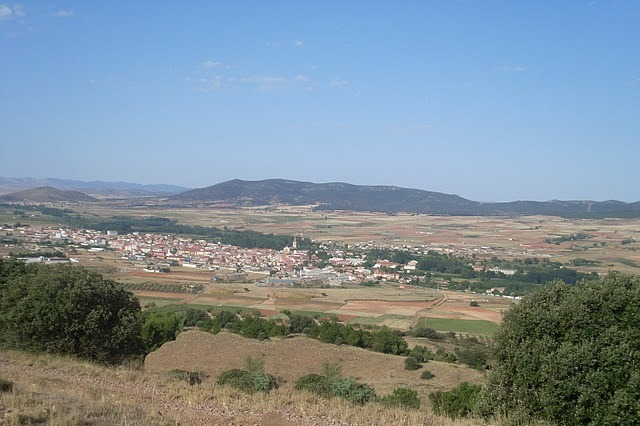 Calamocha